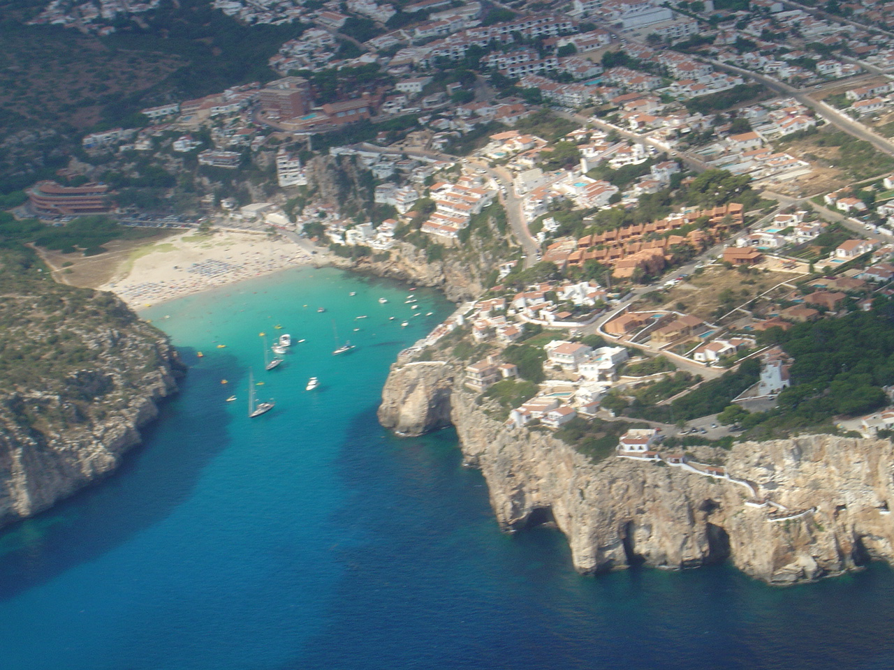 Magnifica playa de Cala en Porter desde el aire.